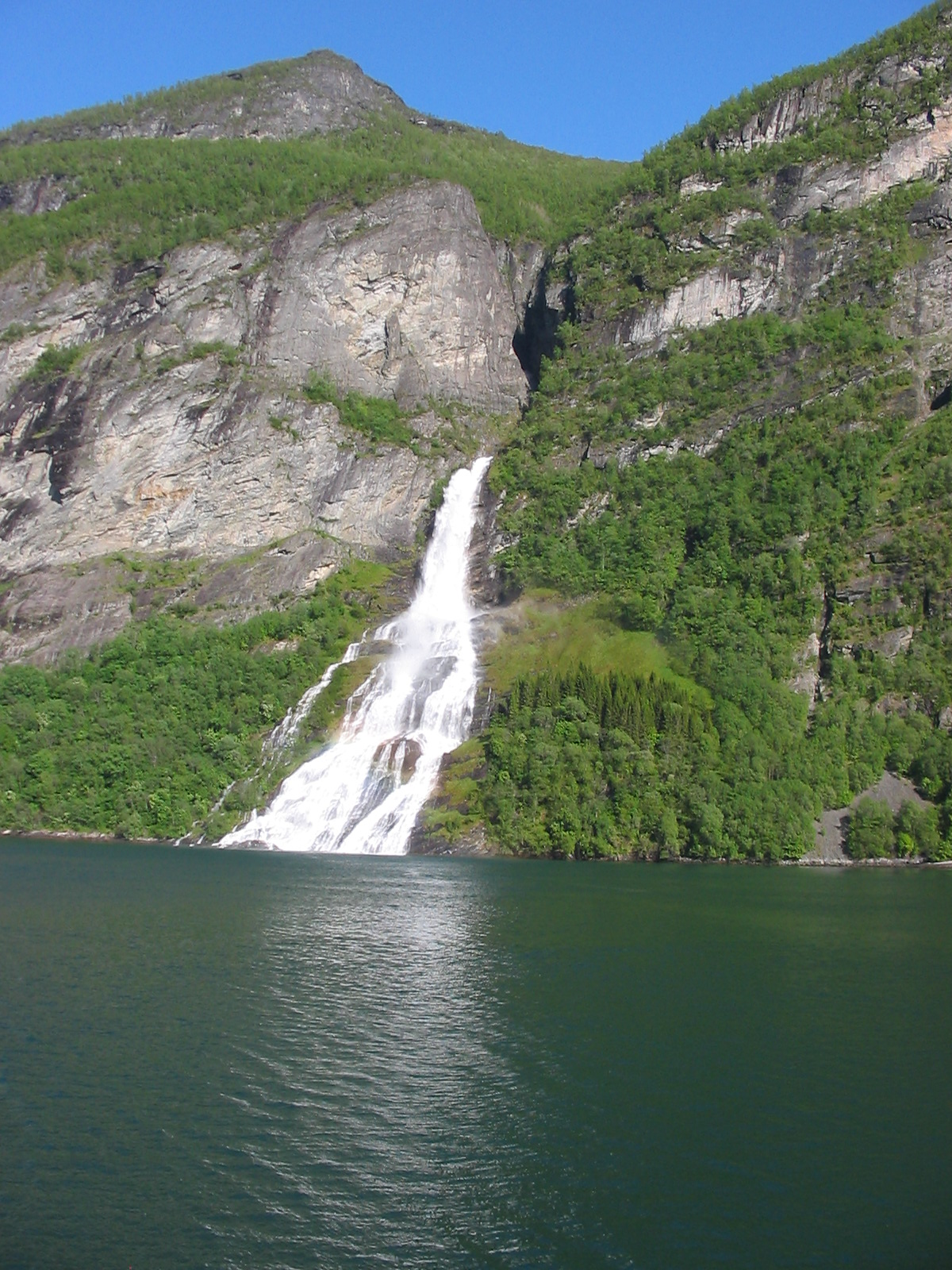 Man sieht den Freierwasserfall, der sich gegenüber der sieben Schwestern befindet.